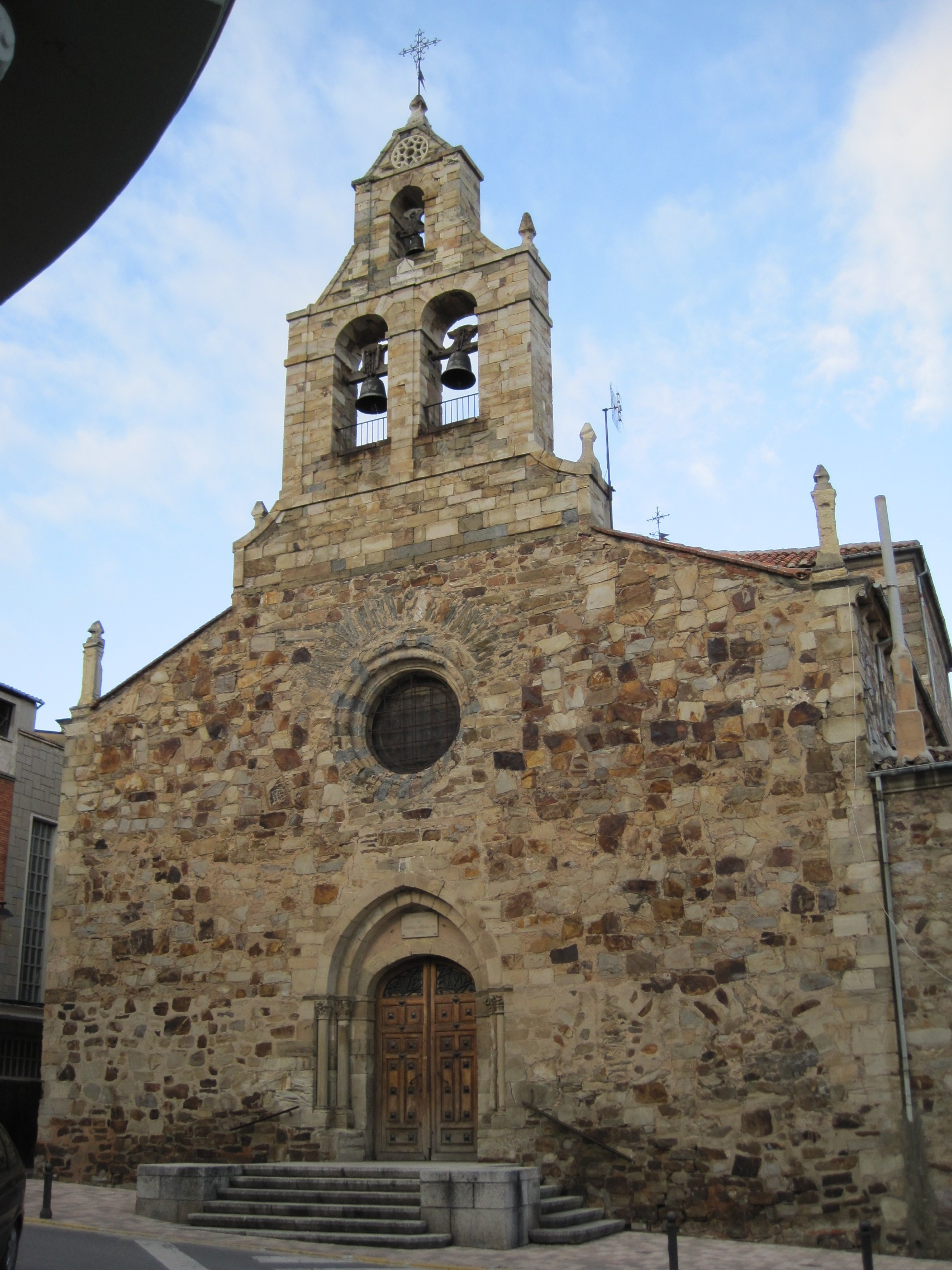 Santuario de Nuestra Señora de Fátima, Astorga (León, España).